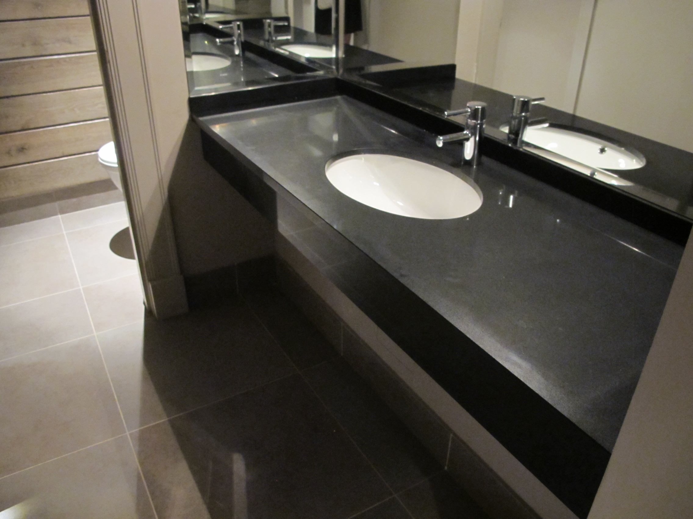 Столешница из кварцевого камня Caesar Stone в ресторане Тануки